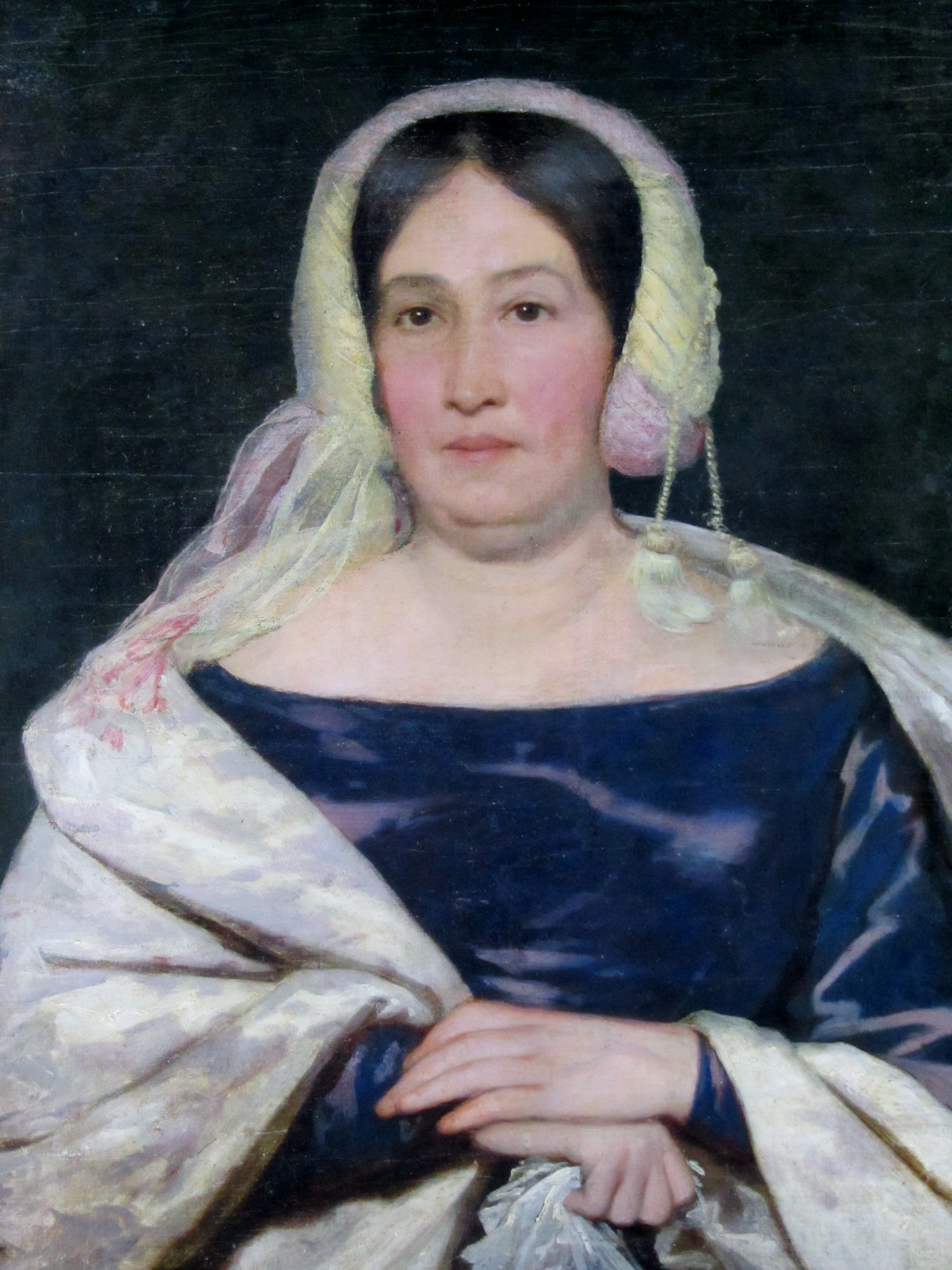 Retrato de Gertrudis Rosales Larraín, madre del pintor chileno José Manuel Ramírez Rosales (1804-1877), discípulo de Monvoisin en París, donde se hicieron amigos.